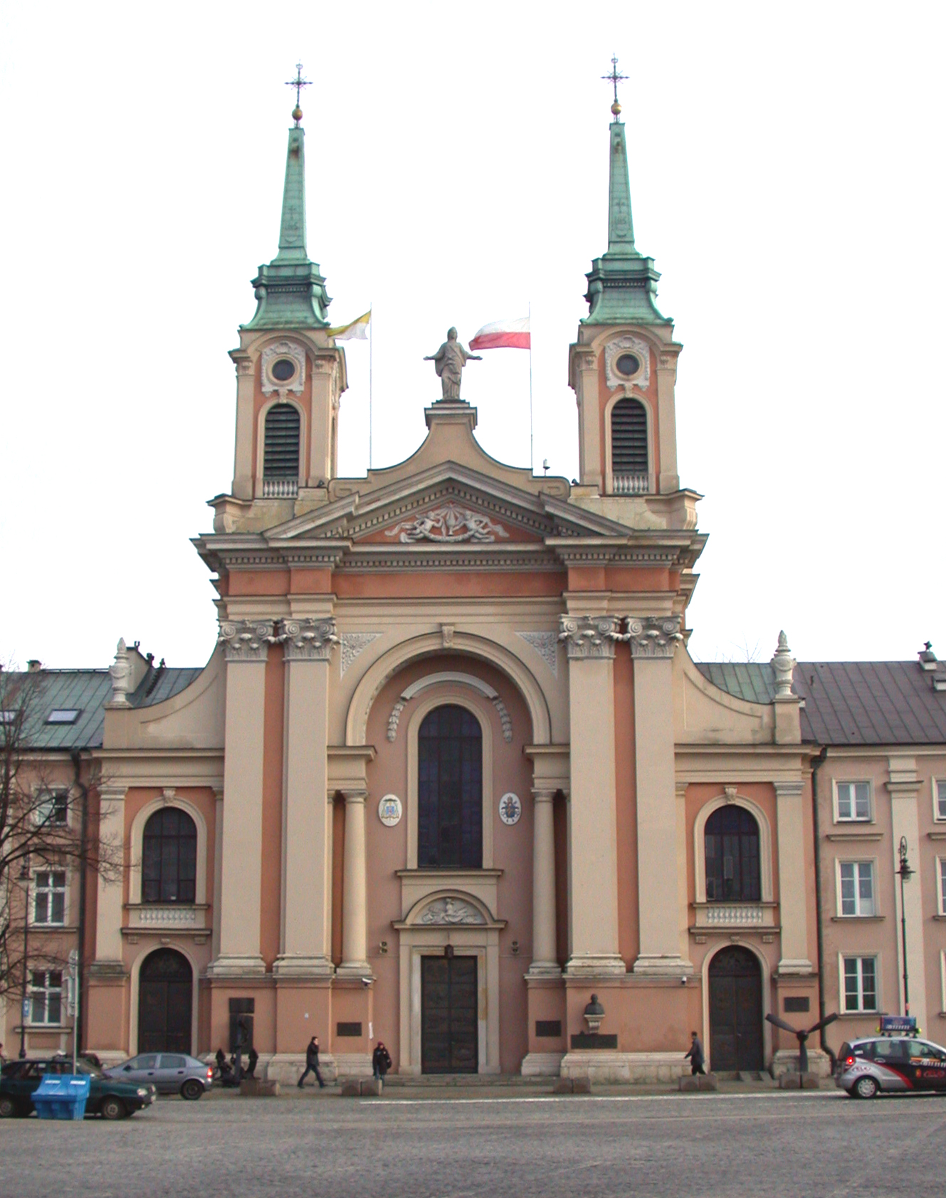 Varsavia, chiesa di Nostra Signora della Polonia (Katedra Polowa Wojska Polskiego), facciata su piazza Krasiński (Plac Krasińskich)